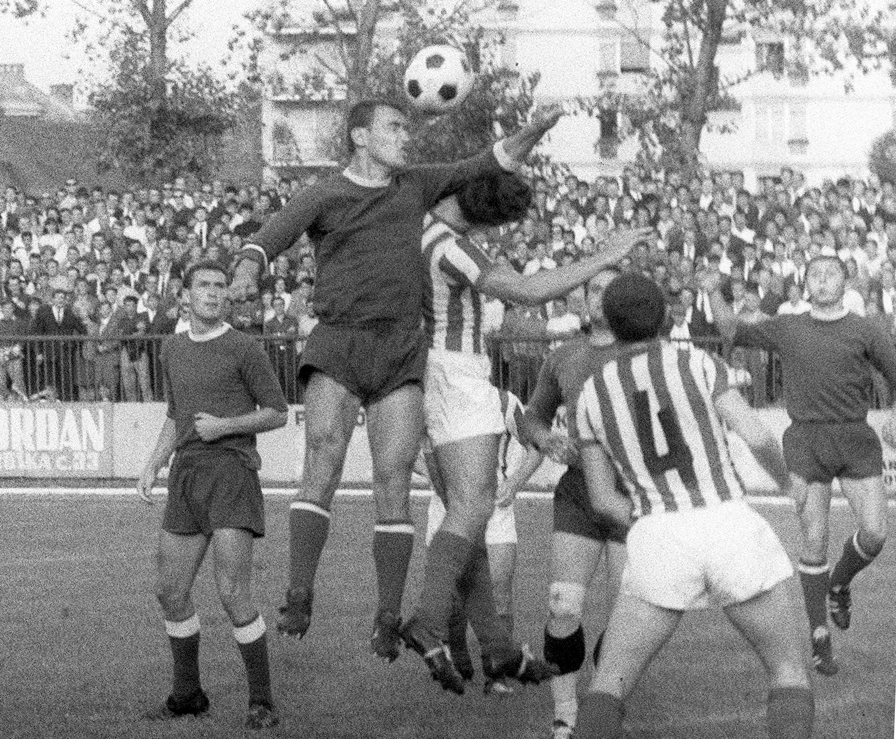 Nogomet Maribor - Proleter Zrenjanin v prvi zvezni ligi SFRJ.